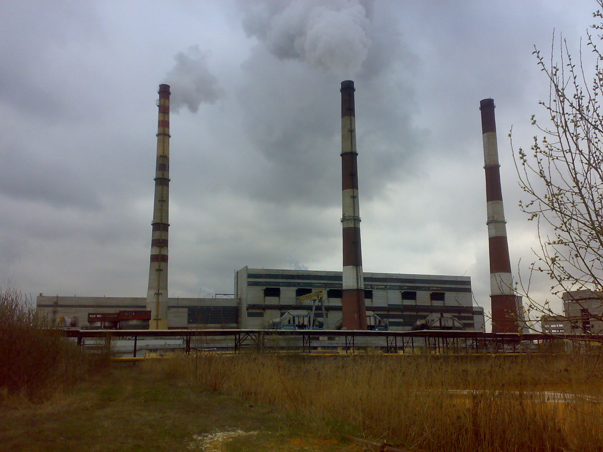 Минская ТЭЦ-4